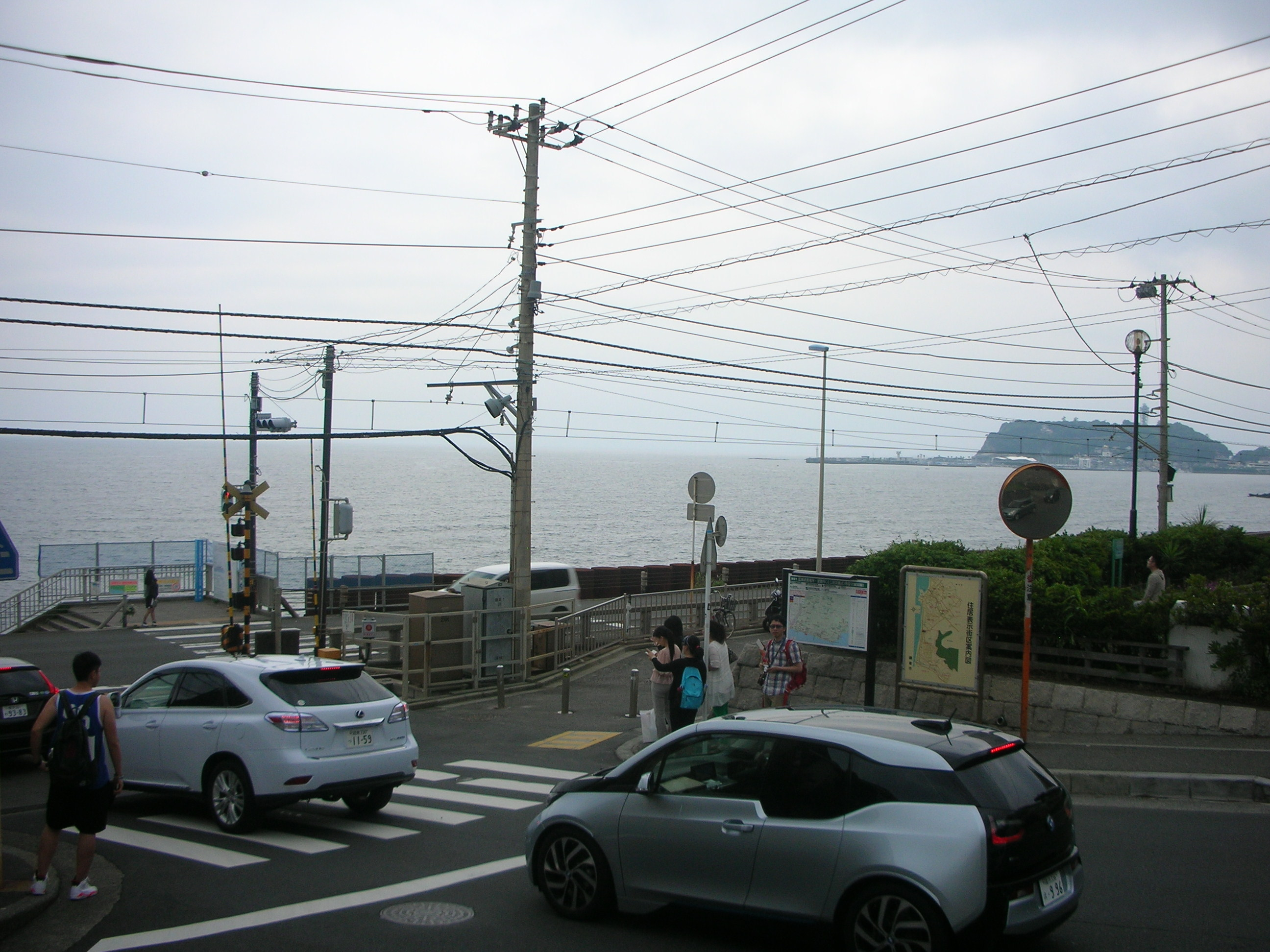 スラムダンクの踏切（江ノ島電鉄線 鎌倉高校前１号踏切）